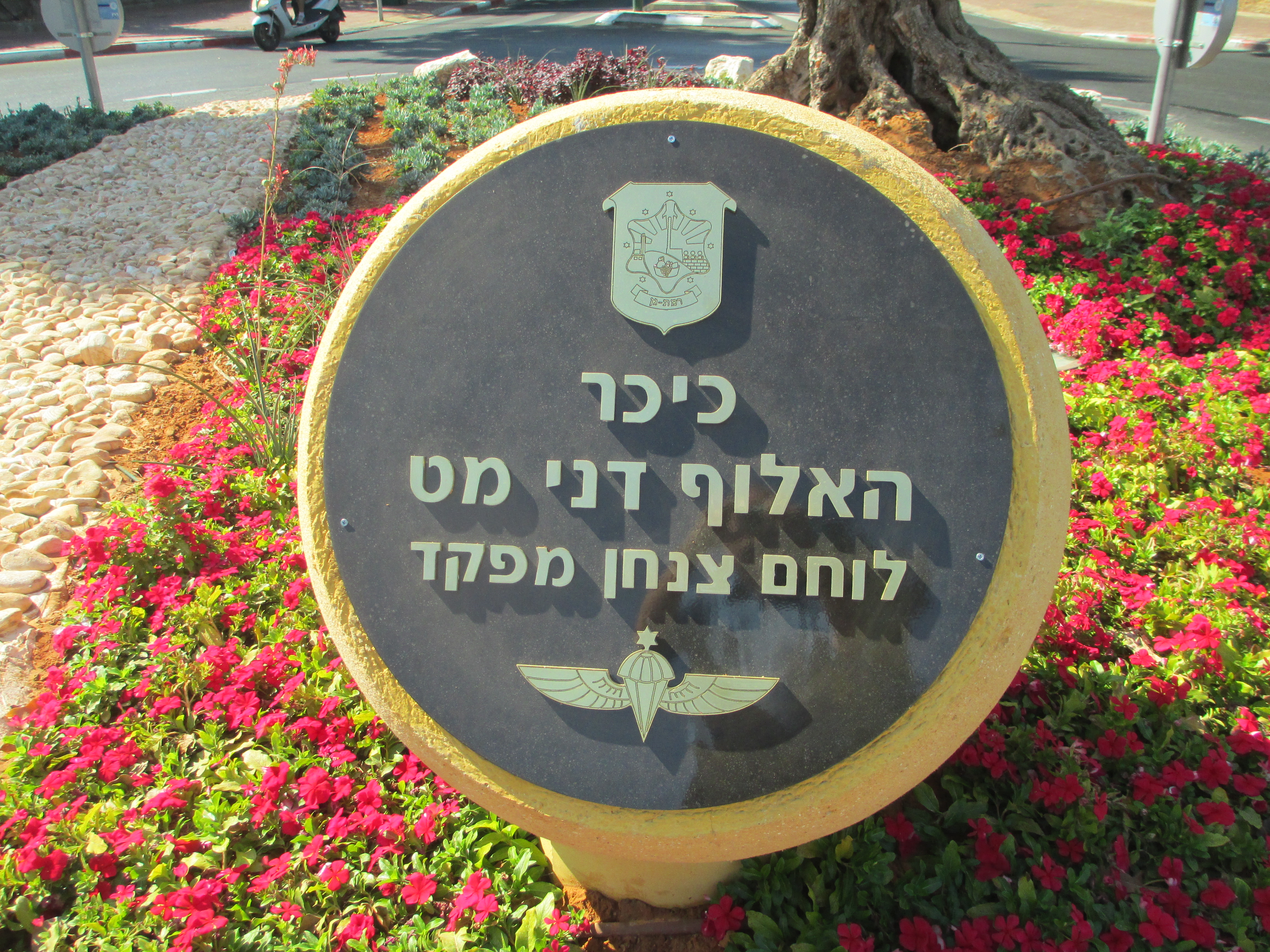 כיכר דני מט ברמת גן